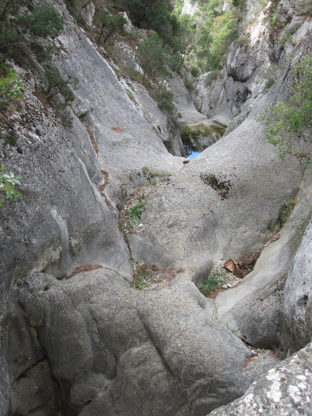 Les marmites du Destel, ruisseau affluent de la Reppe (Var, France)